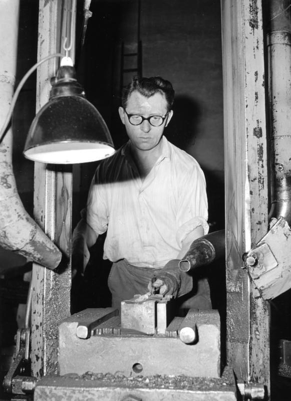 1964 Solingen Firma Müller & Schmidt, Pfeilringenwerk KG Schlagen einer Schere. Die Schere wird aus einem Spaltstück (Stahlstück) warm verformt. Sie wird hier im warmen Zustand in eine Matrize gelegt und mittels Fallhammer verformt.